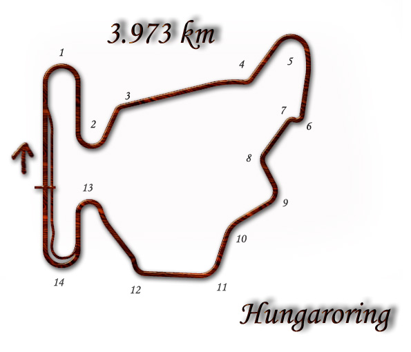 Grand Prix Hungarian /1999/ Autor: Jiří Žemlička